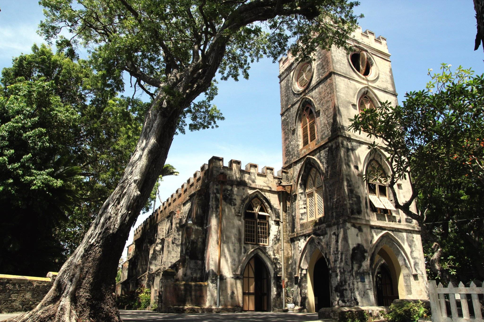 A Igreja Paroquial de São João de Bridgetown Barbados